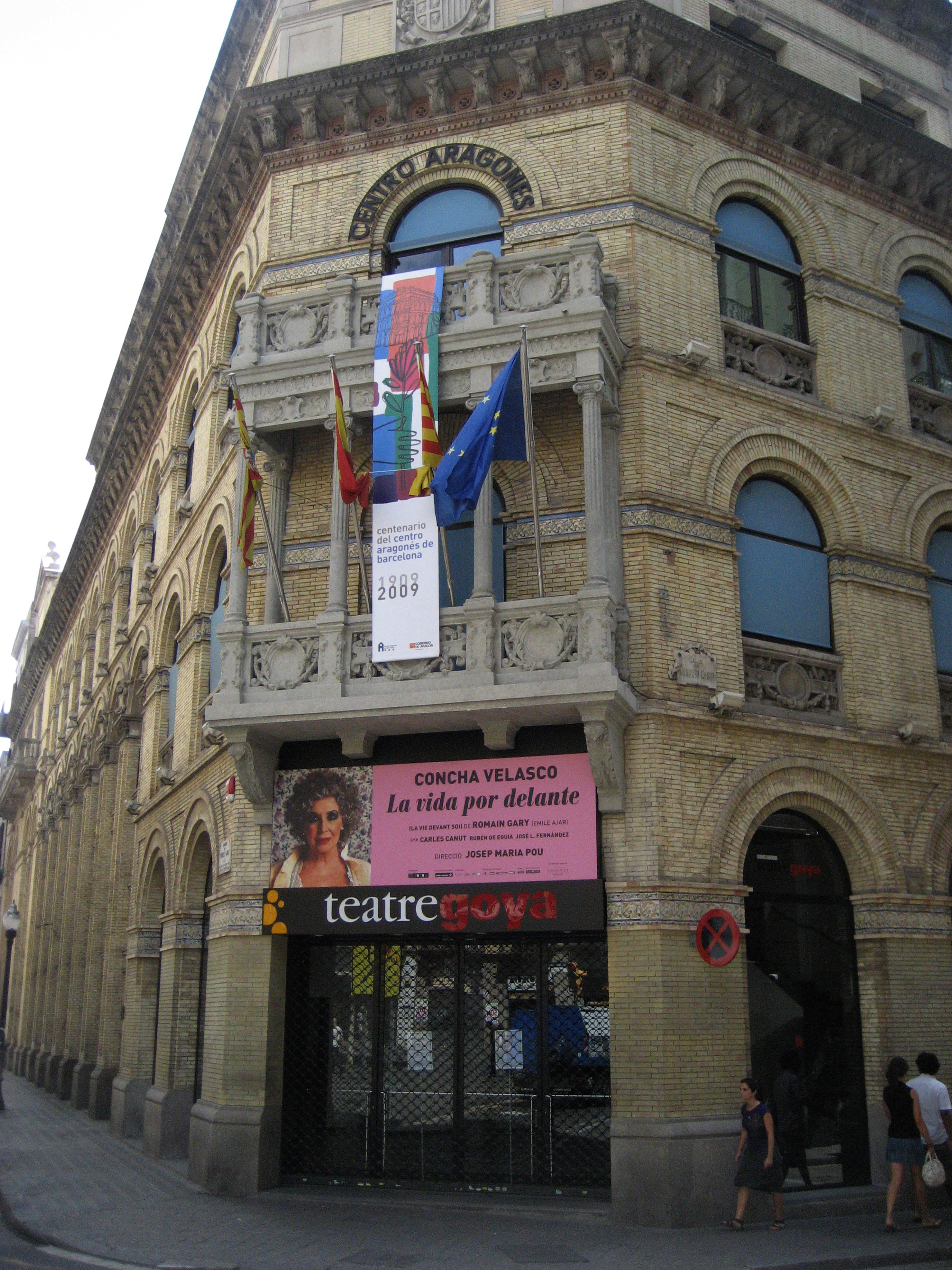 Façana del Teatre Goya de Barcelona_agost 2009